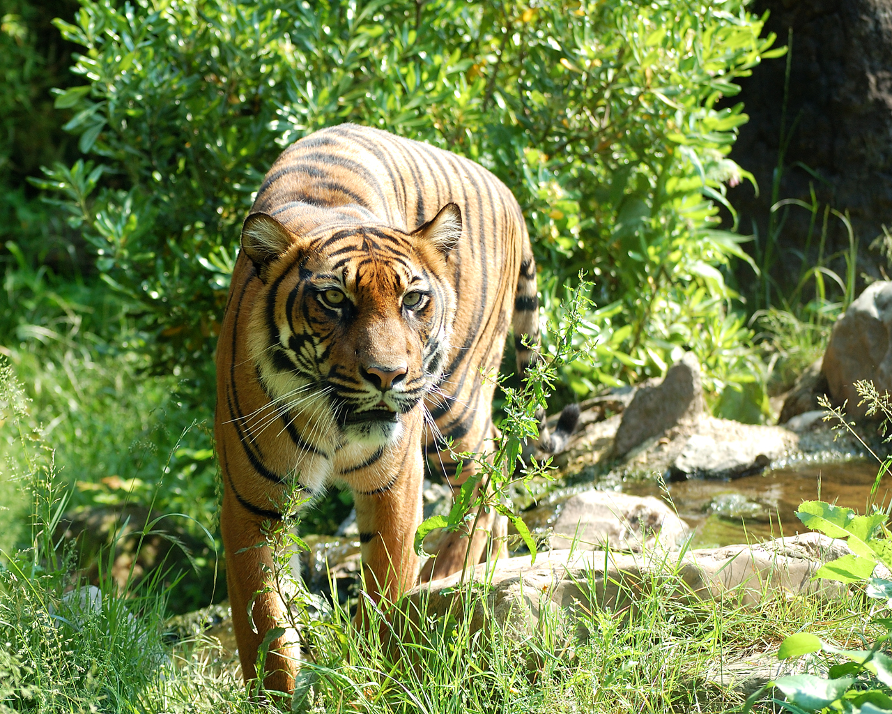 Sumatraanse Tijger, gefotografeerd in Diergaarde Blijdorp Sumatra-Tiger